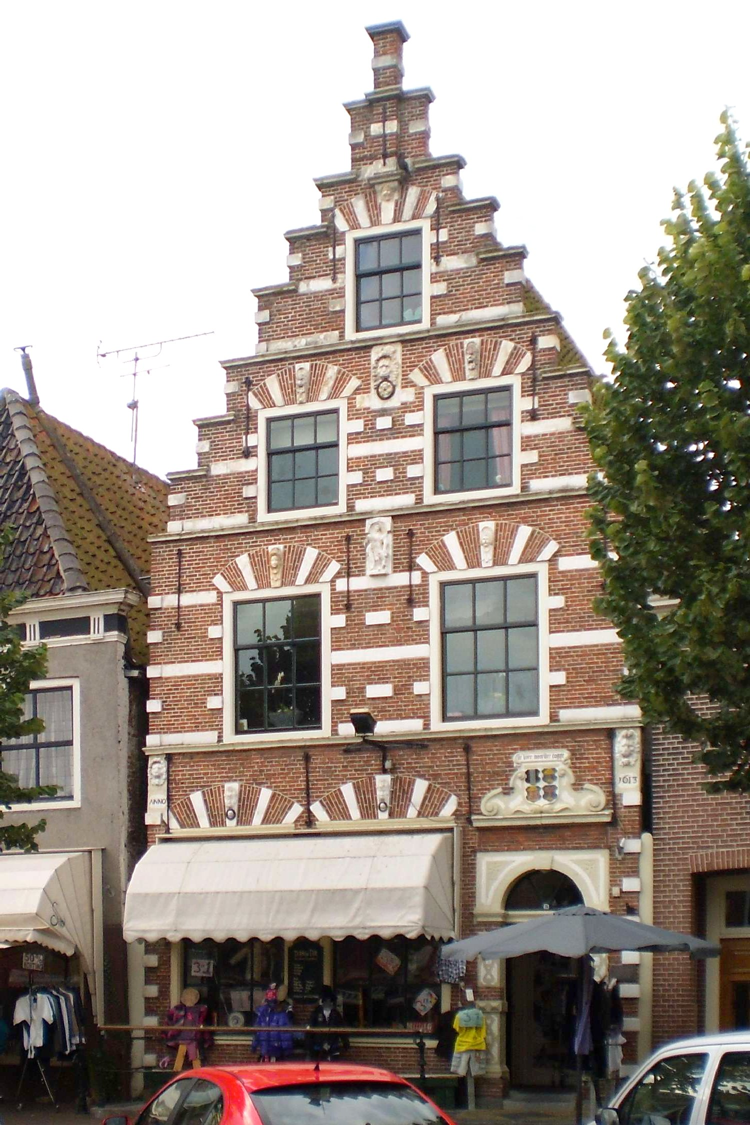 Ofbyld oanbean troch Swarte Kees op 14 augustus 2009